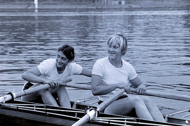 Bydgoszcz 82 - 2x Gedanii Gdańsk (Wiesława Kiełsznia, Urszula Niebrzydowska)